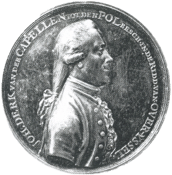 Dankbetuiging aan Van der Capellen door de inwoners van Twente. Herdenkingpenning